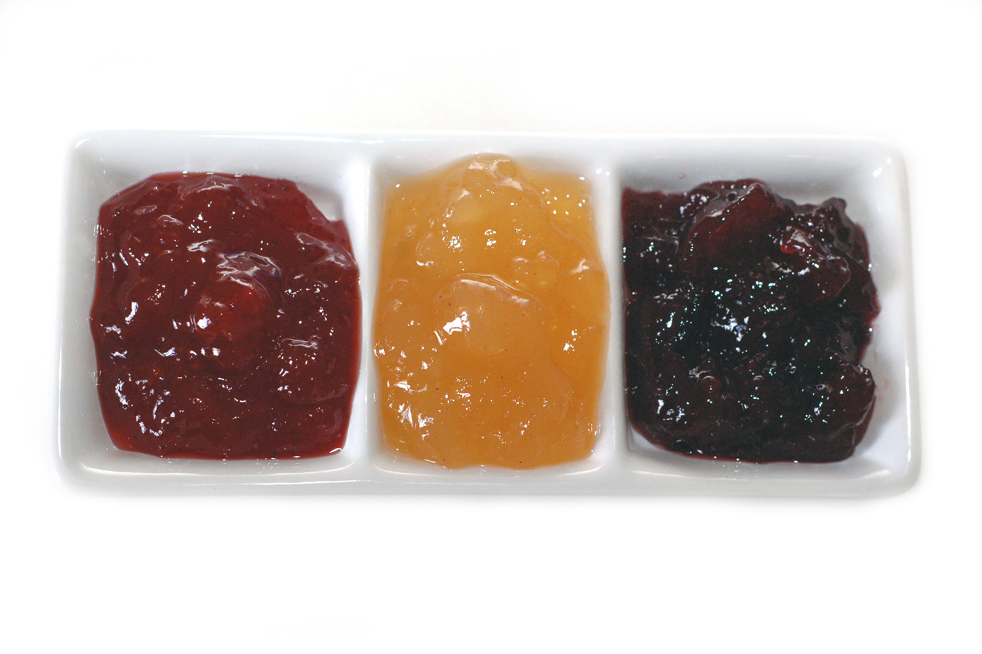 Verschiedene Sorten Konfitüre, von links: Erdbeer, Quitte, rote Pflaume Different sorts of jam, from left: strawberry, quince, red plum Wide-Narrow-Wide